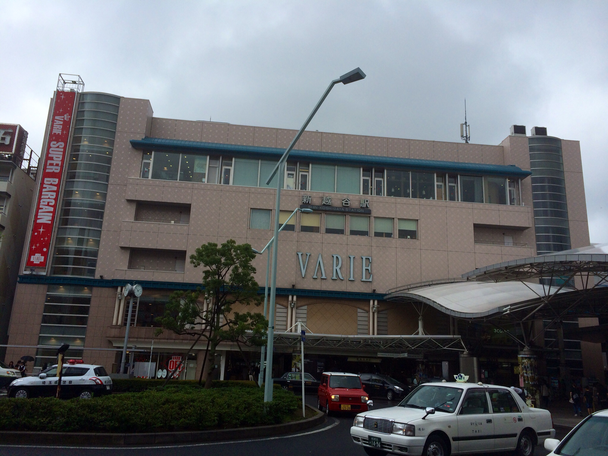 Shin-Koshigaya Station on the Tobu Skytree Line, with the "Varie" station complex above